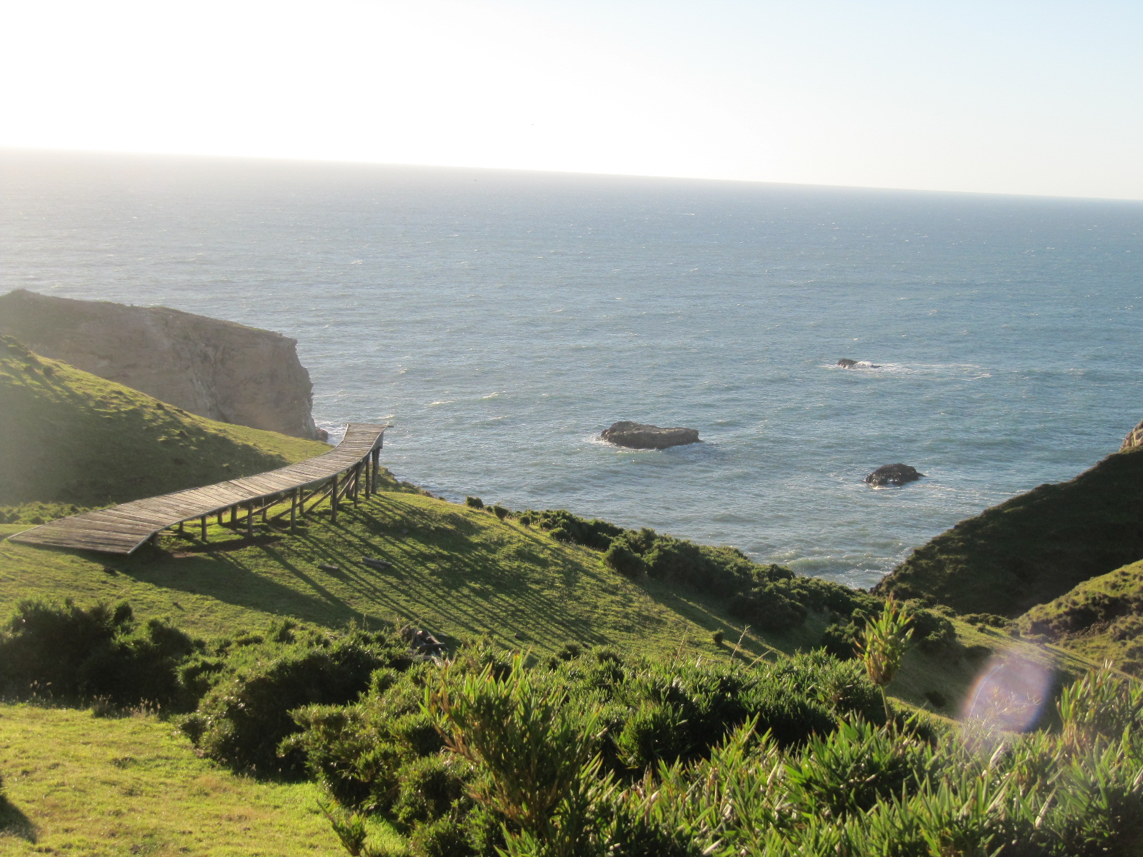 Muelle de las Ánimas en la punta Pirulil, extremo sur de la bahía de Cucao, en la comuna de Chonchi, Isla Grande de Chiloé, Chile.